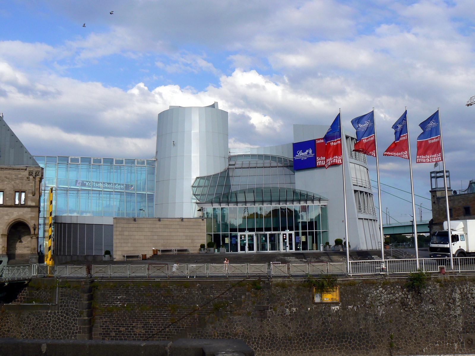 Eingang vom Schokoladenmuseum (Imhoff-Stollwerck-Museum am Rheinauhafen) in Köln.